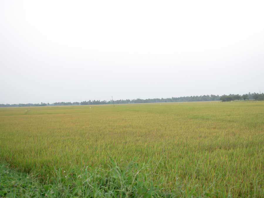 കുട്ടനാട്ടിലെ ഒരു നെൽപ്പാടം. എടത്വയ്ക്കടുത്ത് നിന്നൊരു ദൃശ്യം